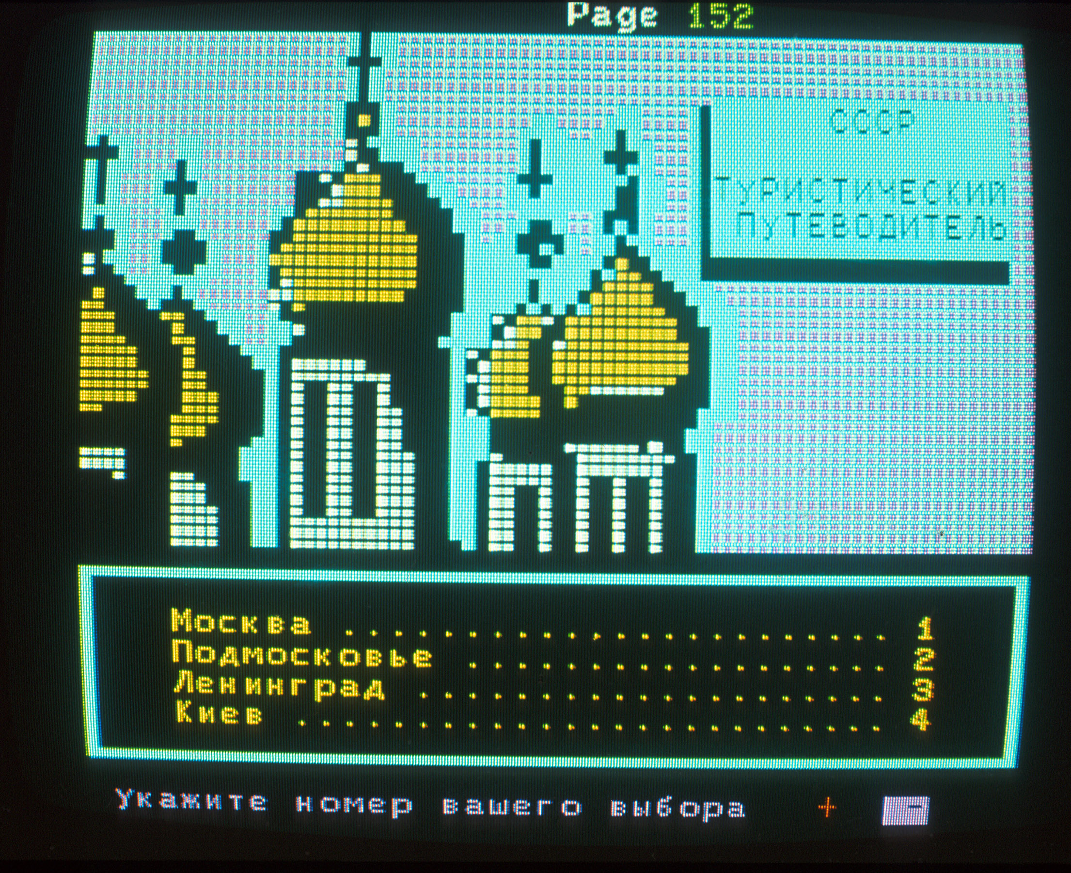 Page Vidéotex en mode parallèle utilisant les mosaïques séparés. Utilisée lors de l'exposition СПОРТ76 en Septembre 1976 à Moscou par TDF et le CCETT.